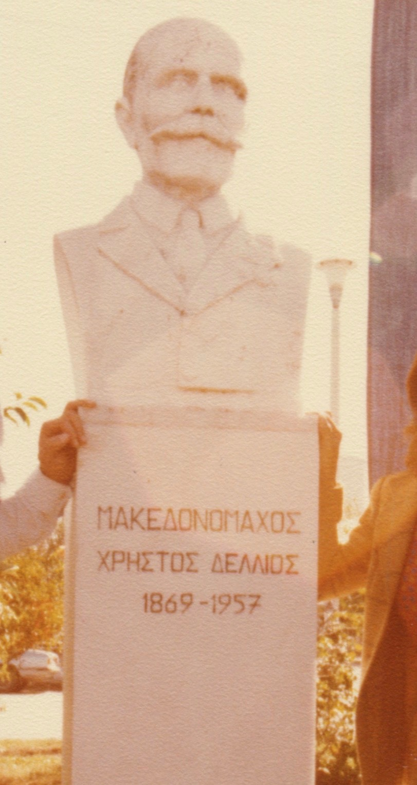 Προτομή του Χρήστου Δέλλιου στην Κορυφή Ημαθίας, φιλοτεχνημένη από τον καθηγητή Αθανάσιο Μηνόπουλο.